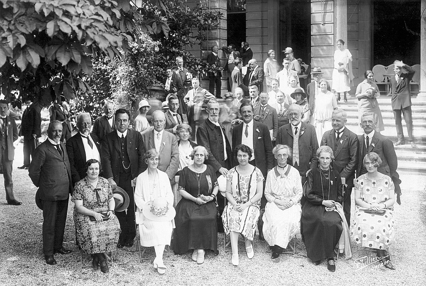 Foto de grupo de partoprenantoj, UK 1925 en Ĝenevo.